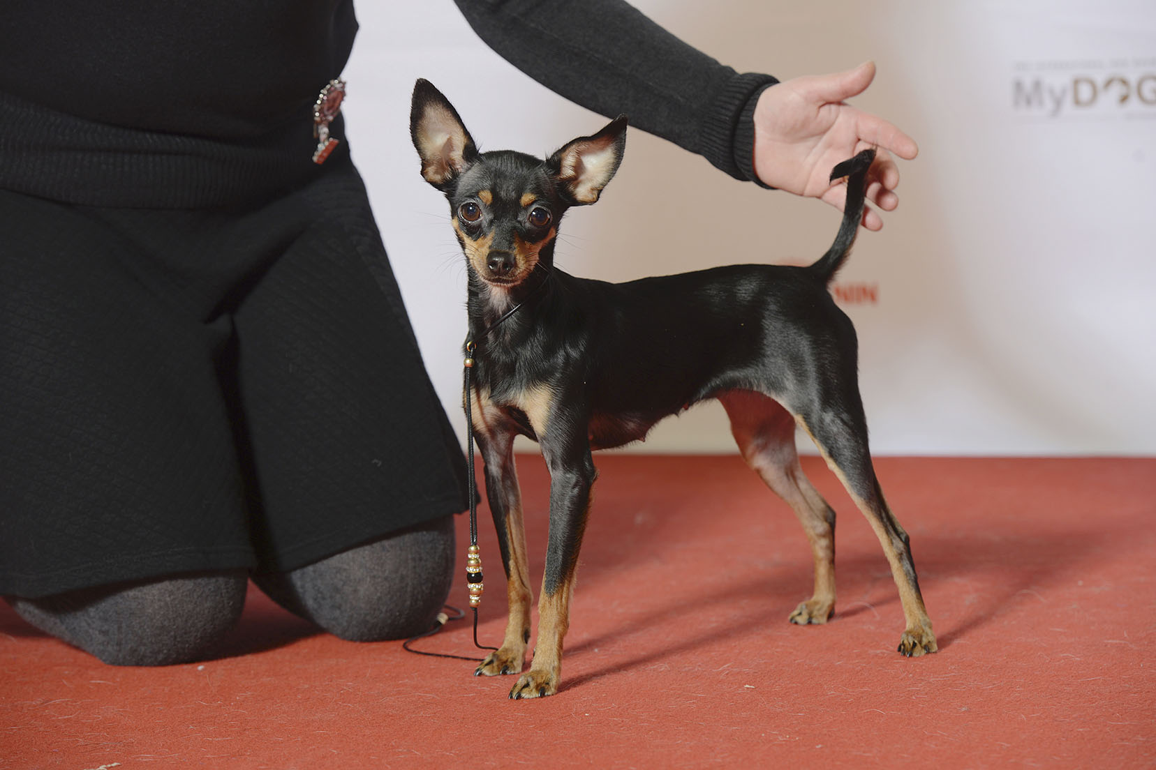 Grupp 9, RUSSKIY TOY, KORTHÅRIG, Superroyal Super Star MyDOG, nordens största hundevenemang.